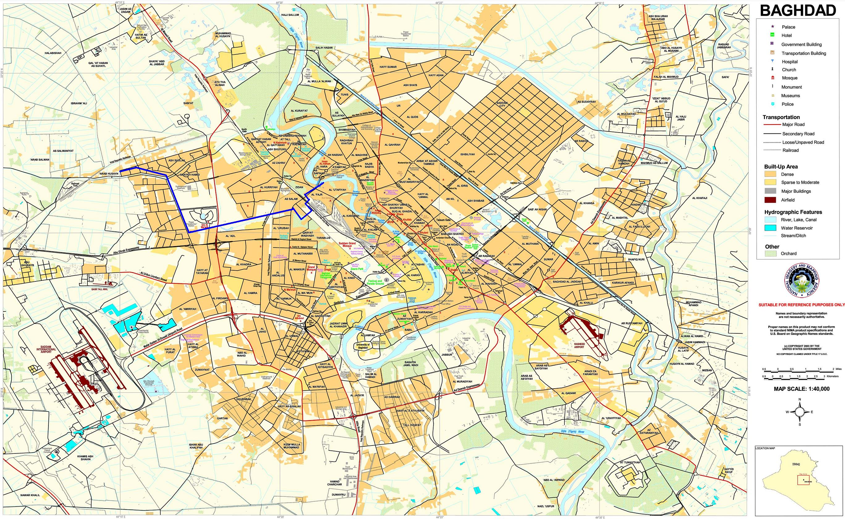 מפת בגדד ב2003 בתוספת הגבולות של שכונת כאט'מיה.